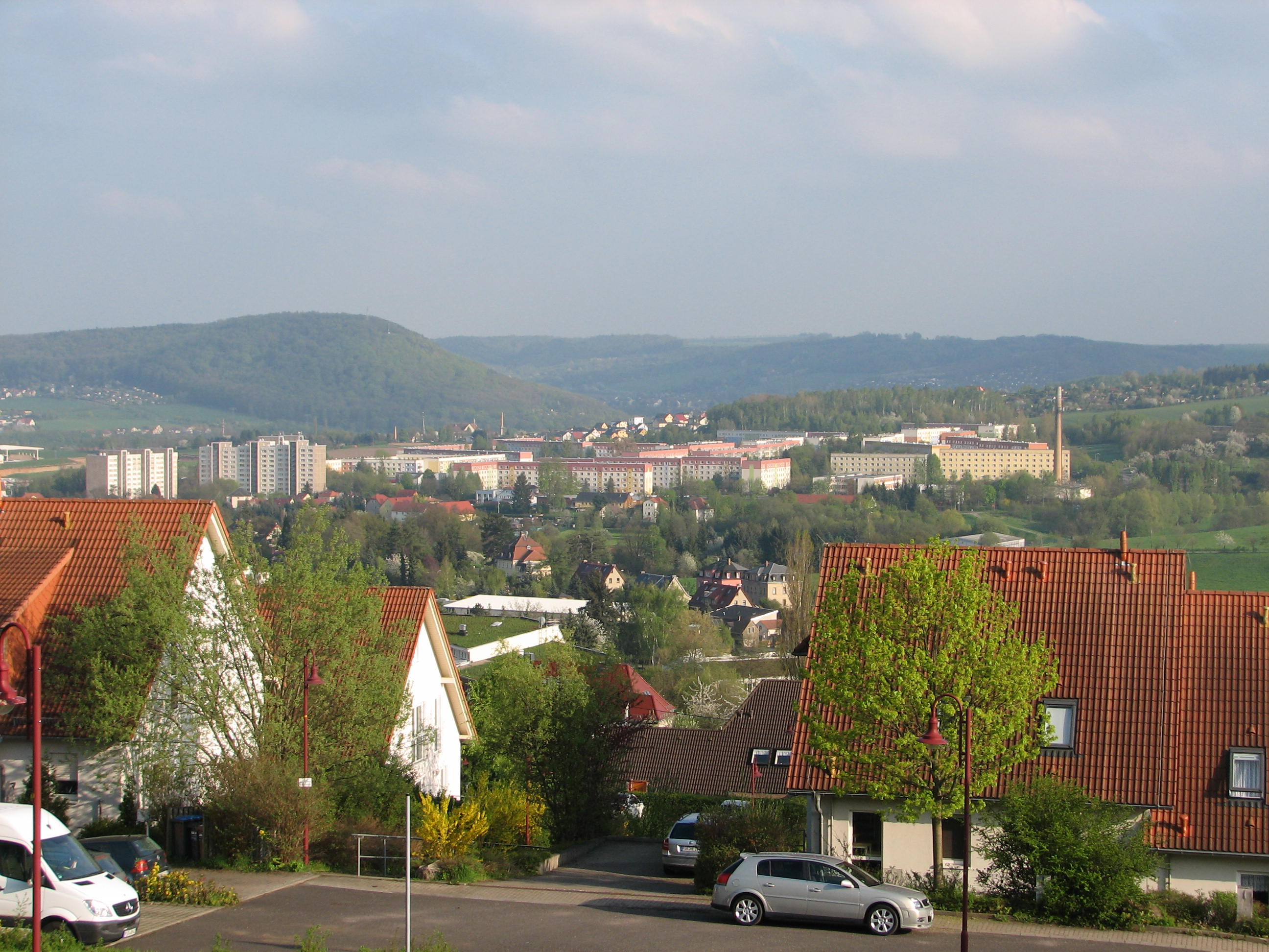 Blick von Wurgwitz auf das Zauckeroder Neubauviertel